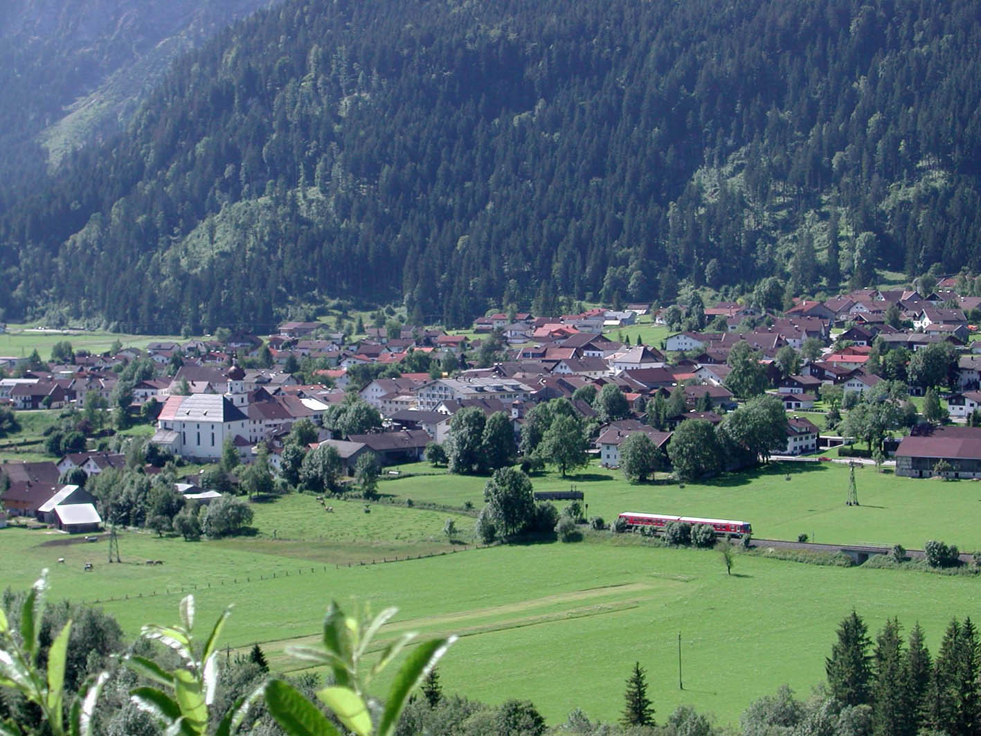 Vils Tirol von Nordwesten